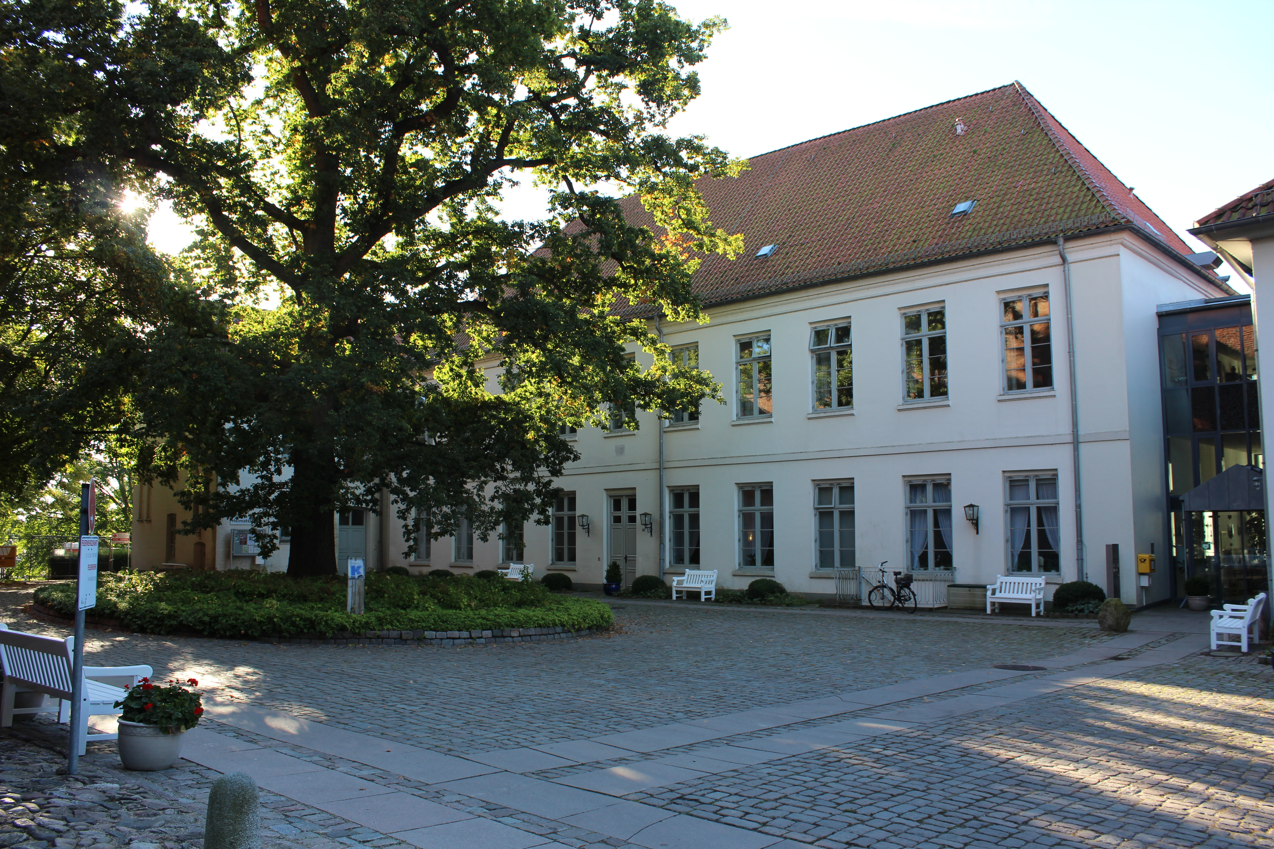 Schleswig-Holstein, Bordesholm, Lindenplatz 11, Amtshaus